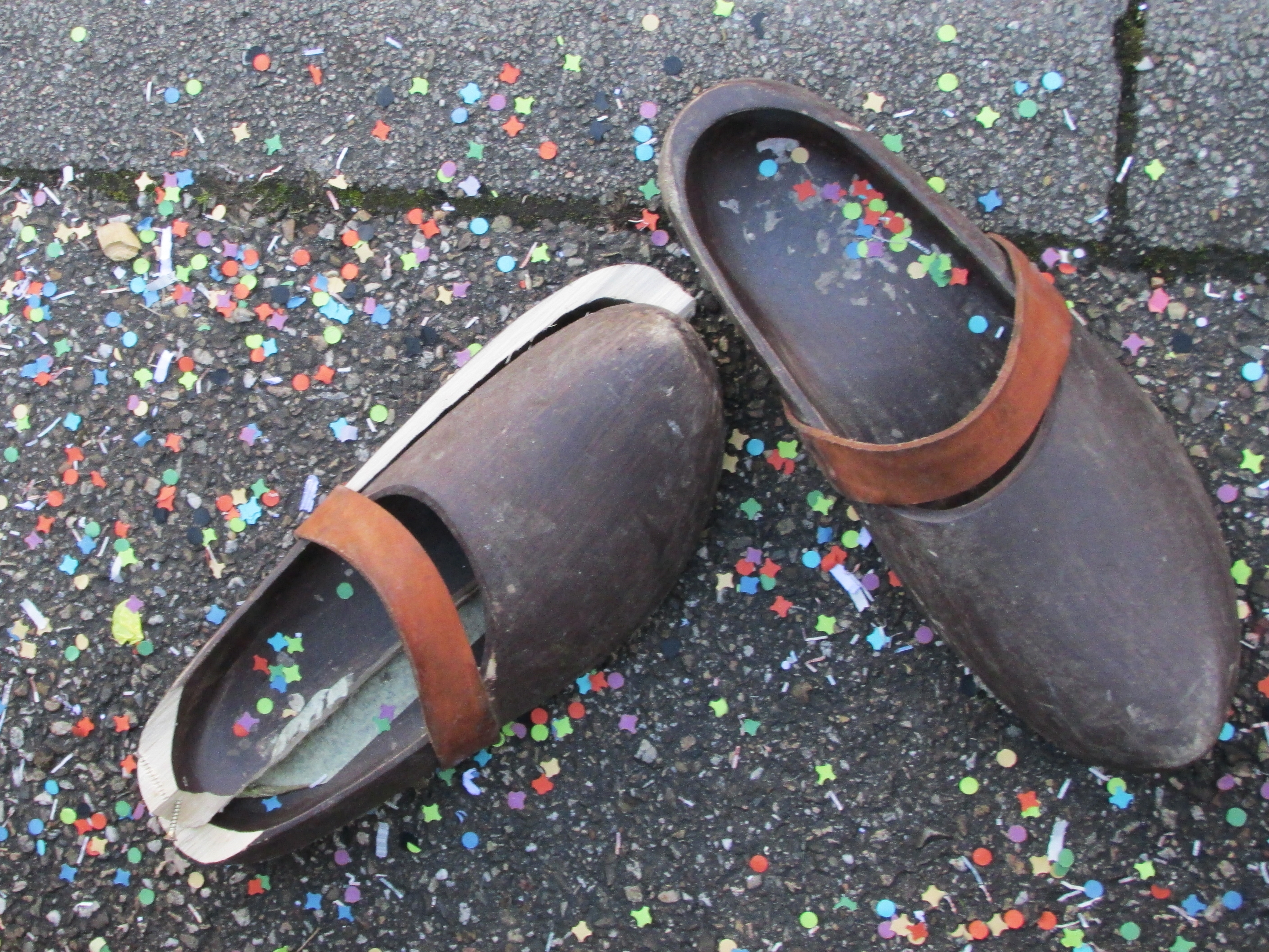 Auer Galepper (Holzschuhe)